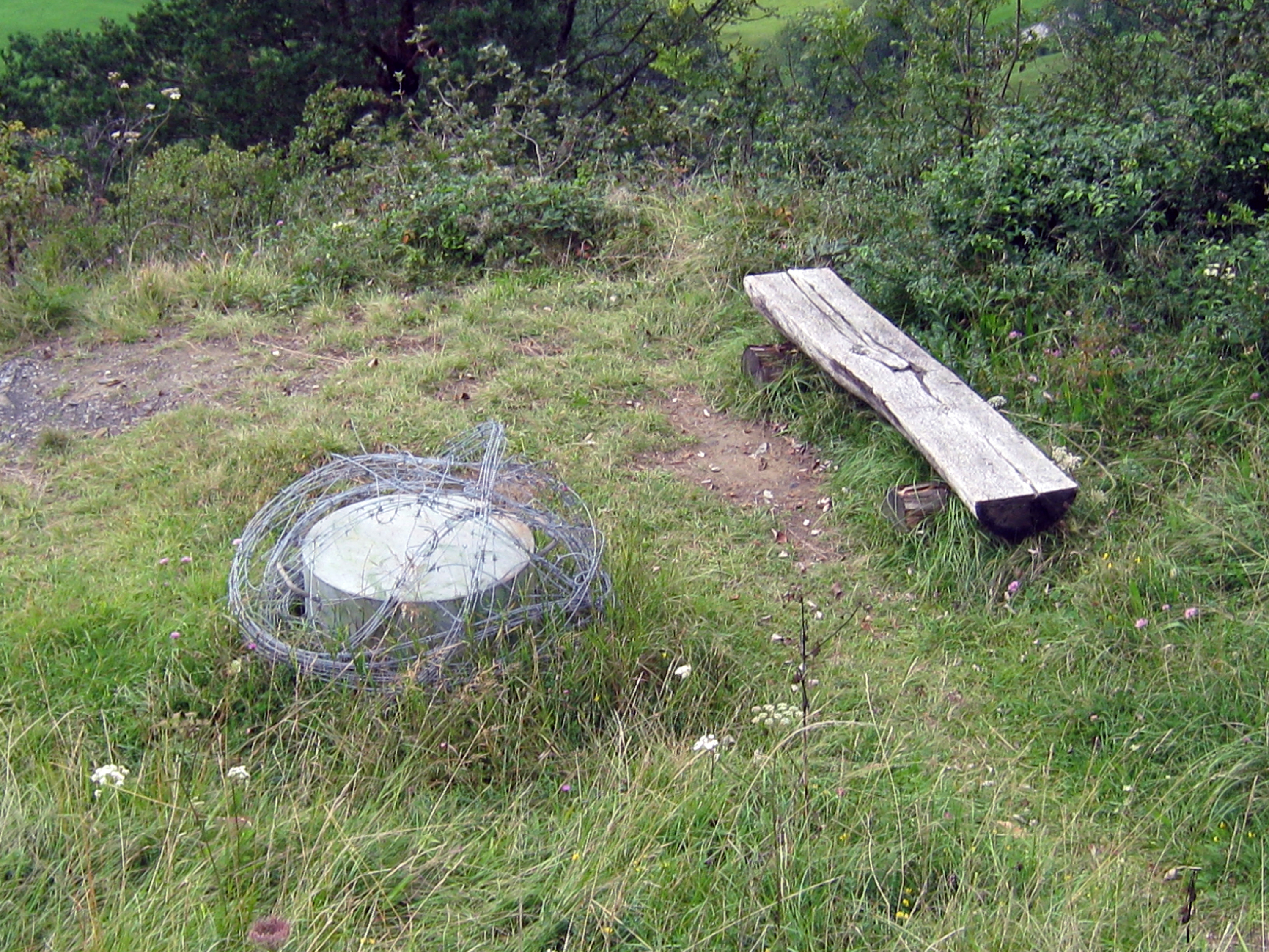 Festung Magletsch, Minenwerfer und Aussichtspunkt